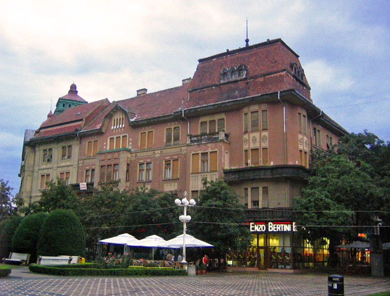 Palatul Hilt, Timişoara Categorie:Imagini din Timişoara , Hilt & Vogel Palace, Timişoara, Romania (László Székely, 1913)